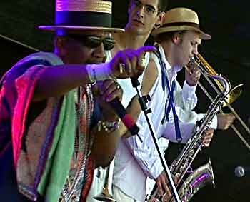 Laurel Aitken Livekonzert